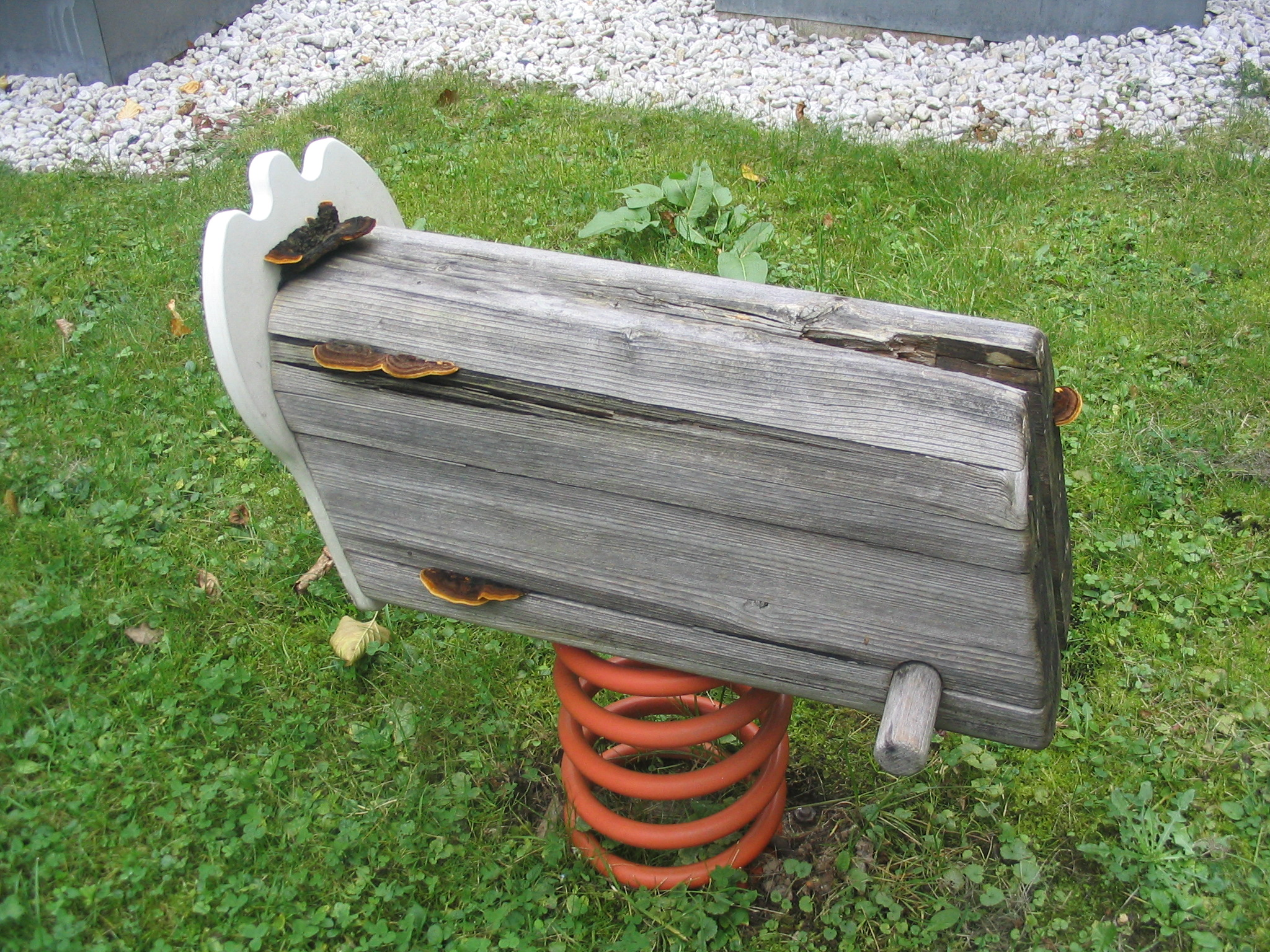 Zaunblättling, Gloeophyllum separium, Vom Zaunblättling befallenes und teilweise zerstörtes Spielgerät., Aufgenommen von Dr. Hagen Graebner, 06.10.2007